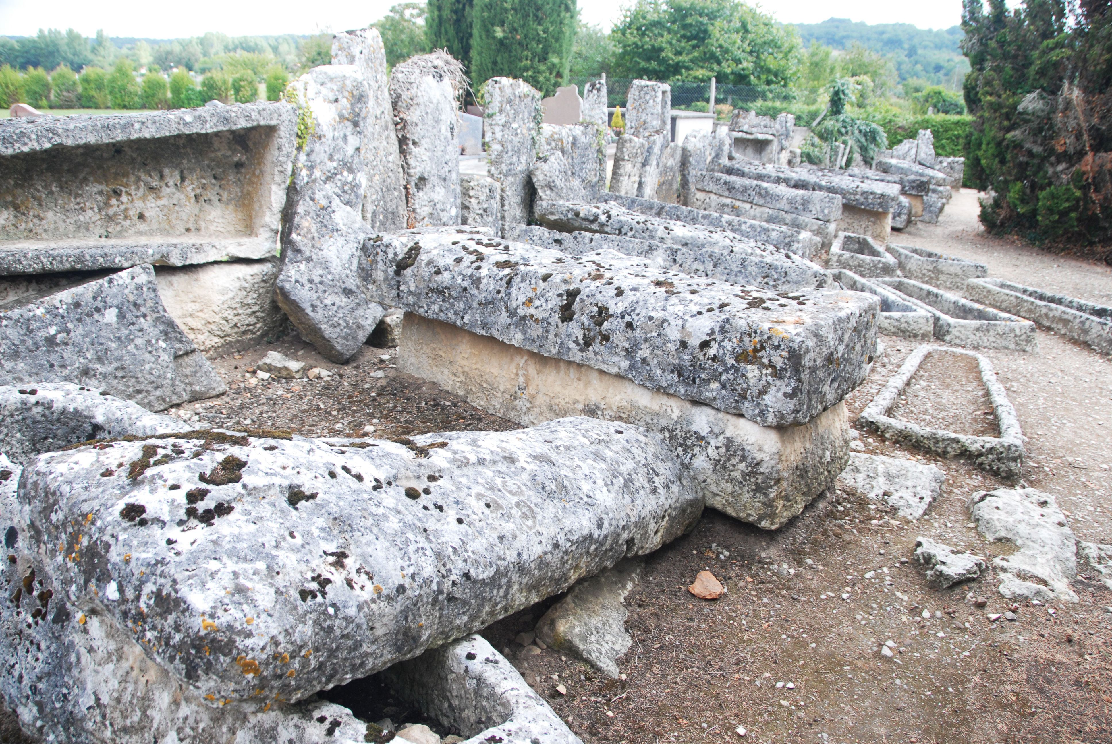 Civaux, Nekropole, Sarkophage